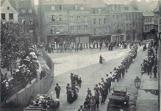 La danse bretonne dérobée de retour de la Saint-Loup à Guingamp au début du XXe siècle.